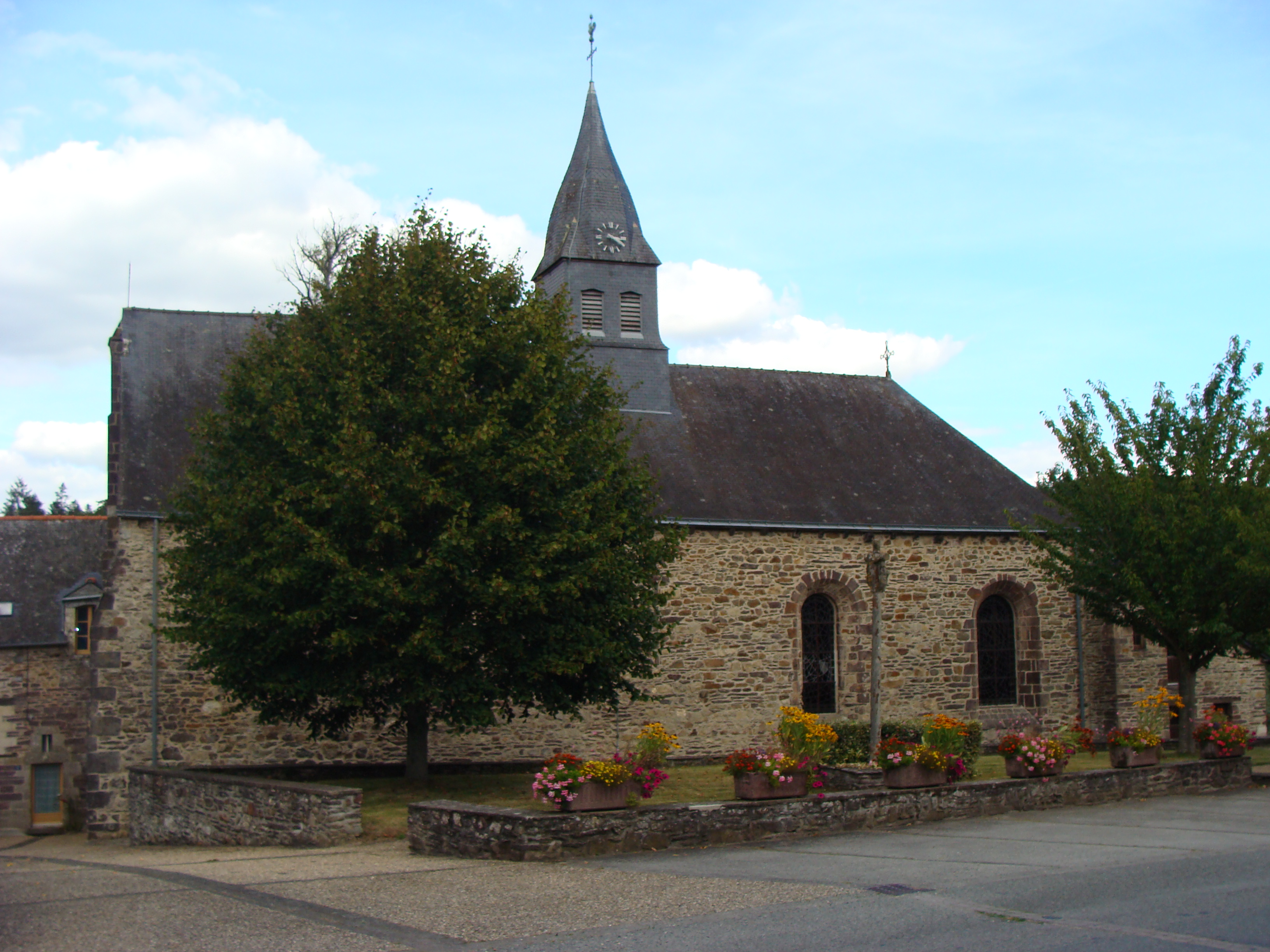 Église Saint-Malo, Le Bourg (Inscrit, 1927) .